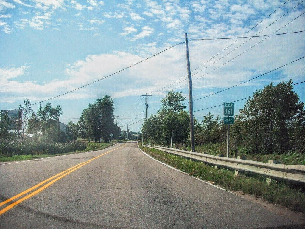 Vue sur la route 361, près de Sainte-Geneviève-de-Batiscan, en Mauricie, Québec, Canada.